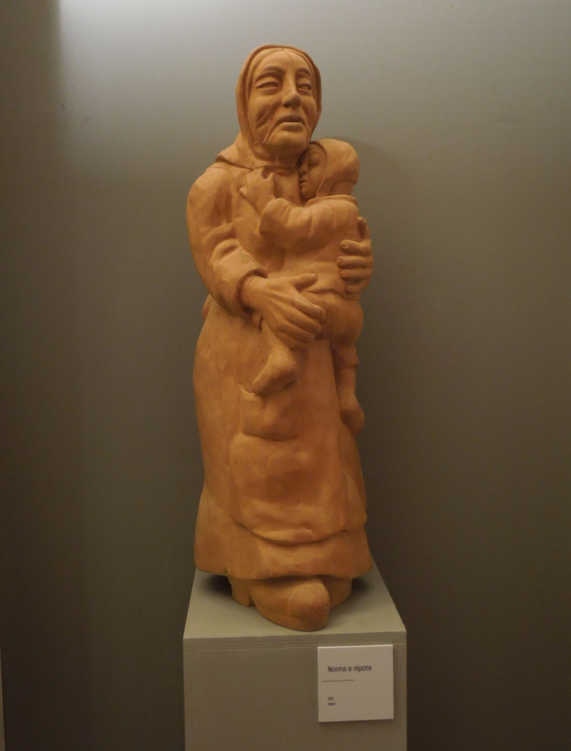 Scultura dal titolo Nonna e nipote, eseguita dalla scultrice e pittrice Annunziata Scipione, esposta presso Palazzo Melatino, sede delle Fondazione Tercas, a Teramo in occasione della mostra “Il fuoco della terra” dedicata alle opere dell’artista.